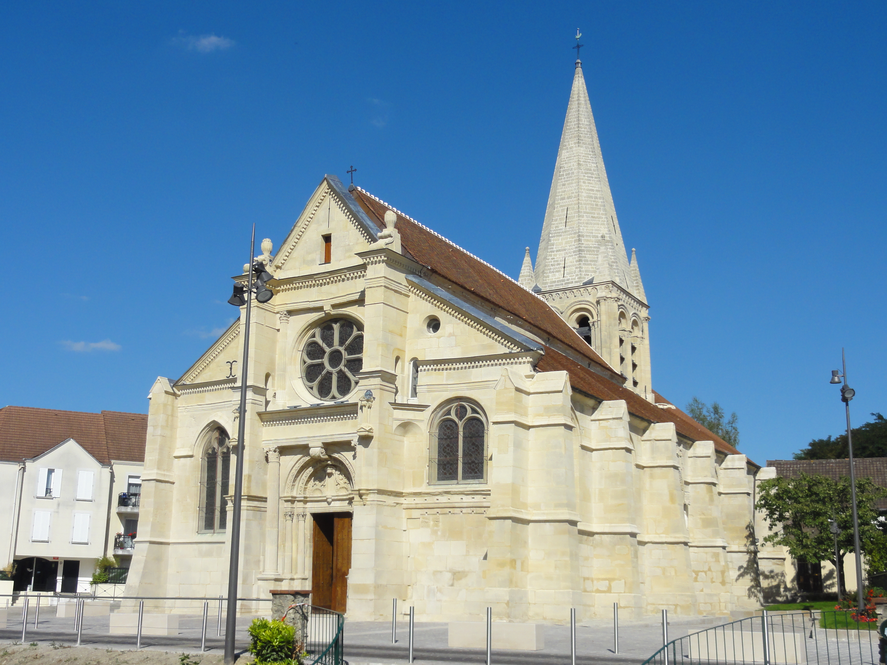 L'église Saint-Pierre-et-Saint-Paul de Sarcelles après sa restauration en 2014-2015 - voir titre.